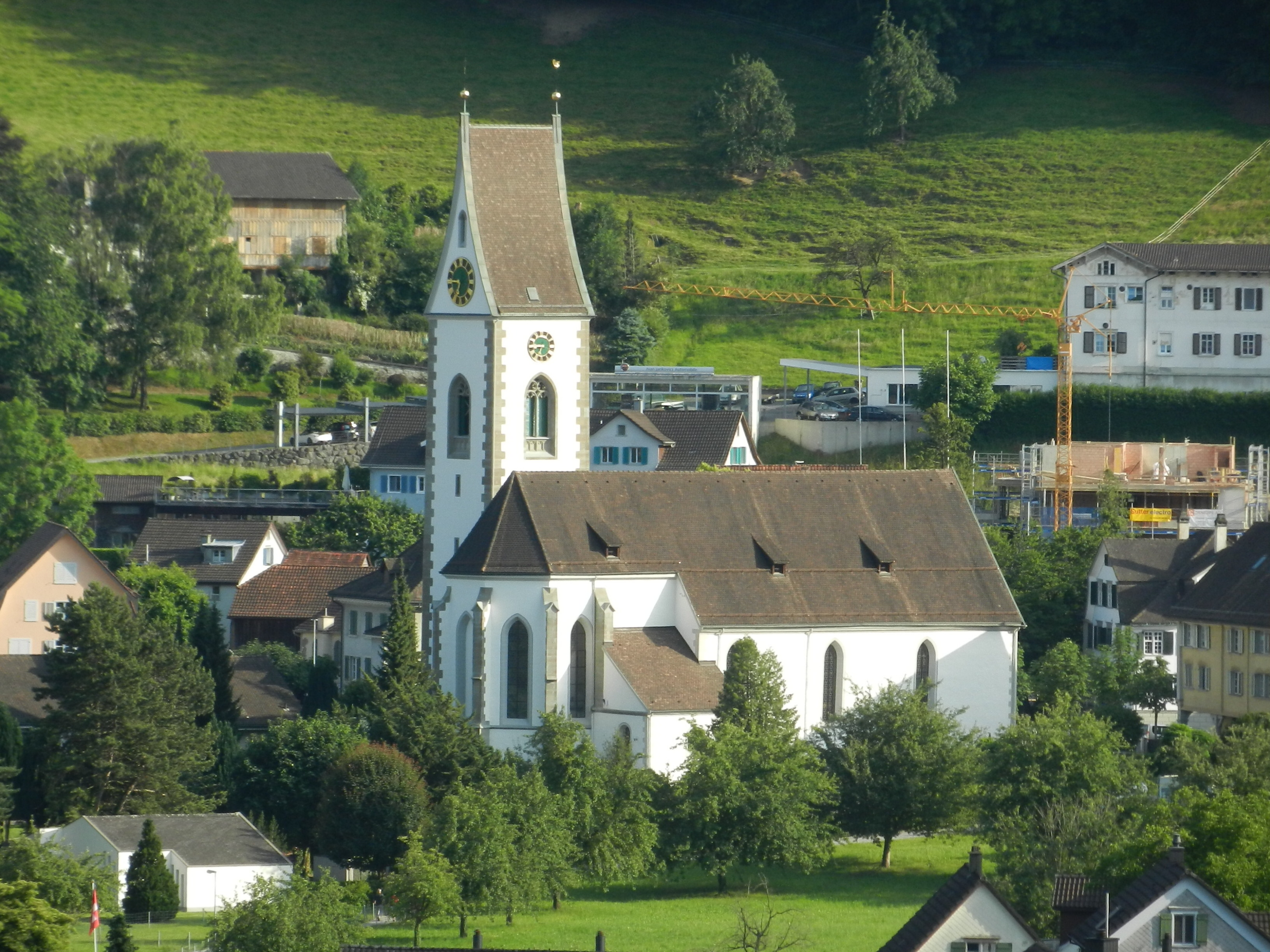 Die Paritätische Kirche Thal SG steht an der Dorfstrasse, mitten im Ortsteil Thal. Aufnahme vom Buchberg, d.h. von der Nordseite.